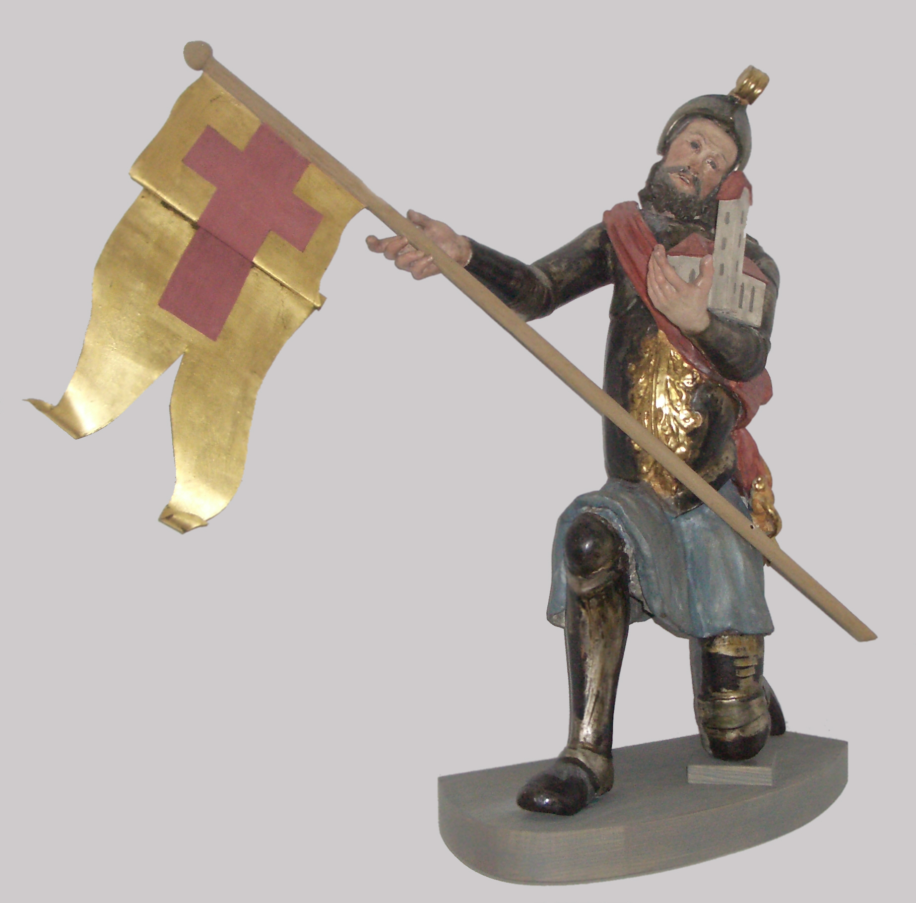 Pfarrkirche St. Dionysius, Hiltensweiler, Stadt Tettnang, Bodenseekreis Figur des Arnold von Hiltensweiler